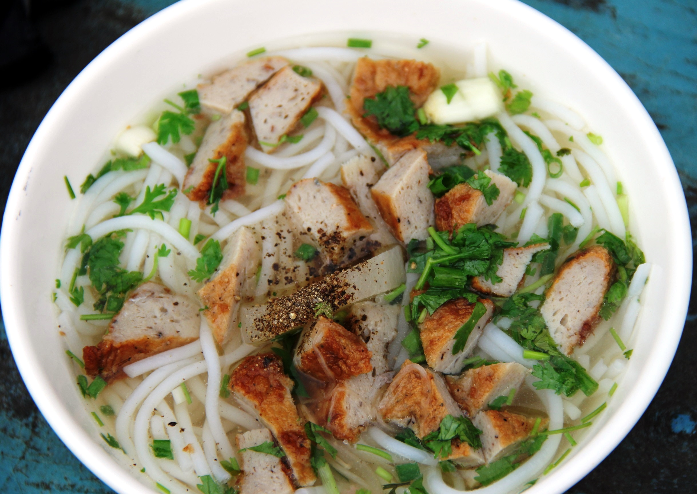 Bún chả cá, tháng 8 năm 2018